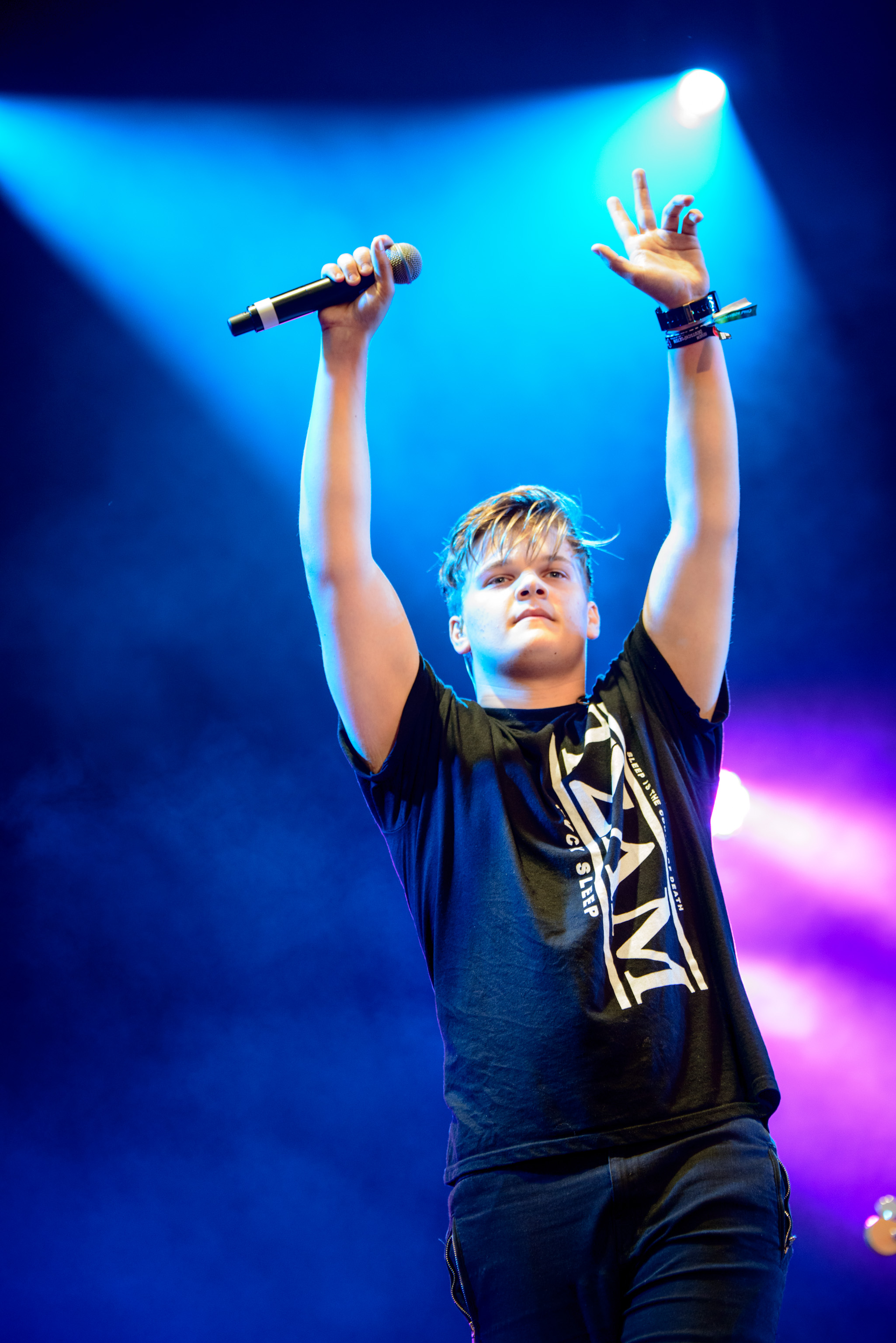 de